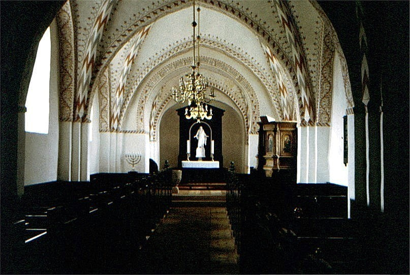 Gerning Kirke kirkerummet; Faurskov Kommune, Jylland, Denmark